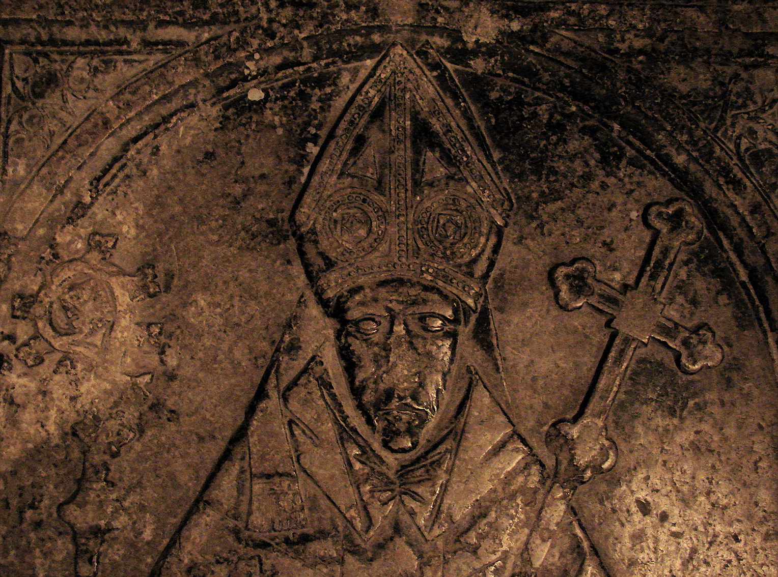 Jens Brostrup, 1420-tallet - 1497, ærkebiskop i Lund 1472-1497, gravsten fra Lund Domkirkes krypt, oprindelig nedlagt i Sten Lykkes kapel, i krypten fra 1908